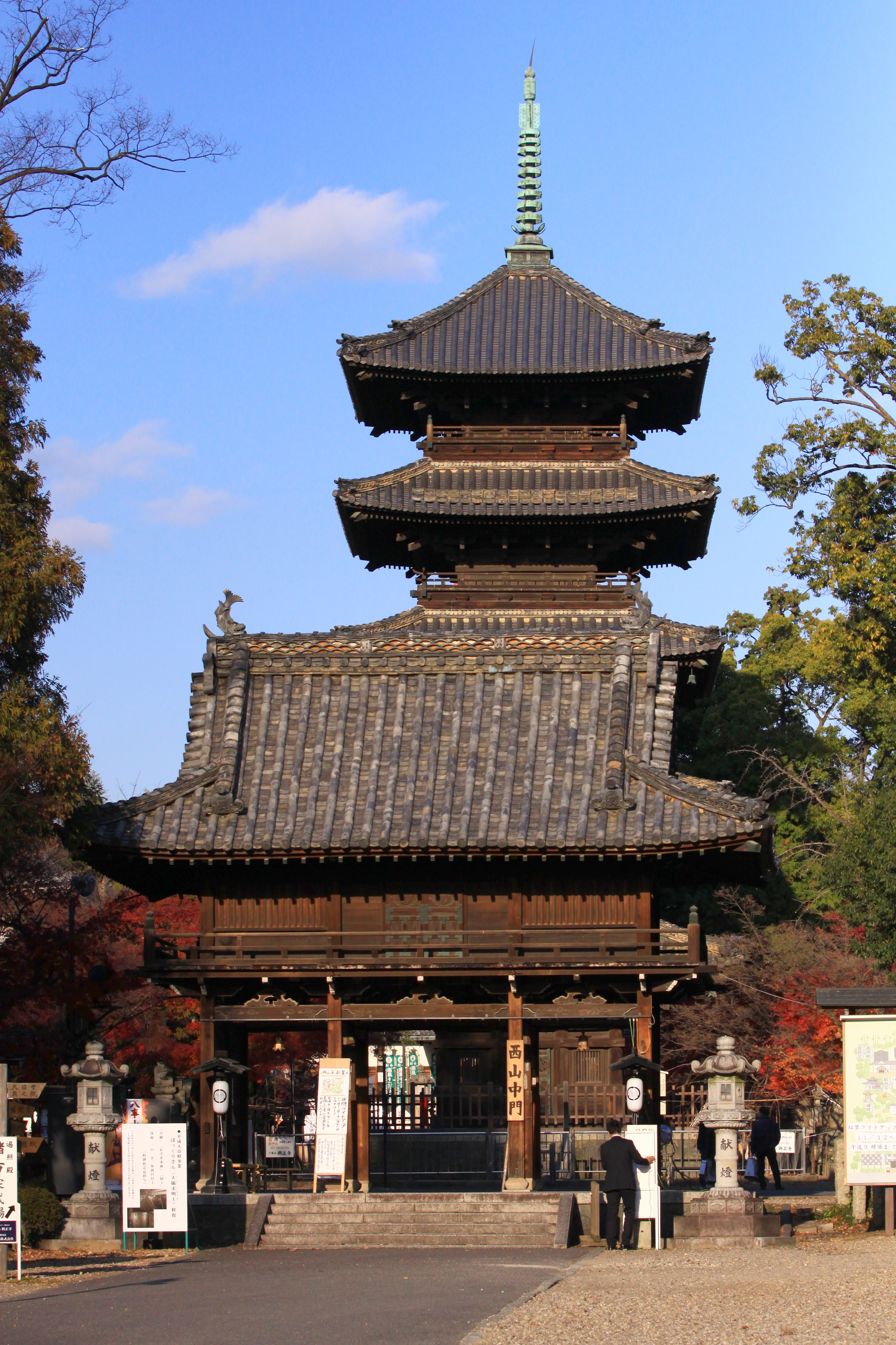 八事興正寺 (愛知県名古屋市昭和区八事本町)